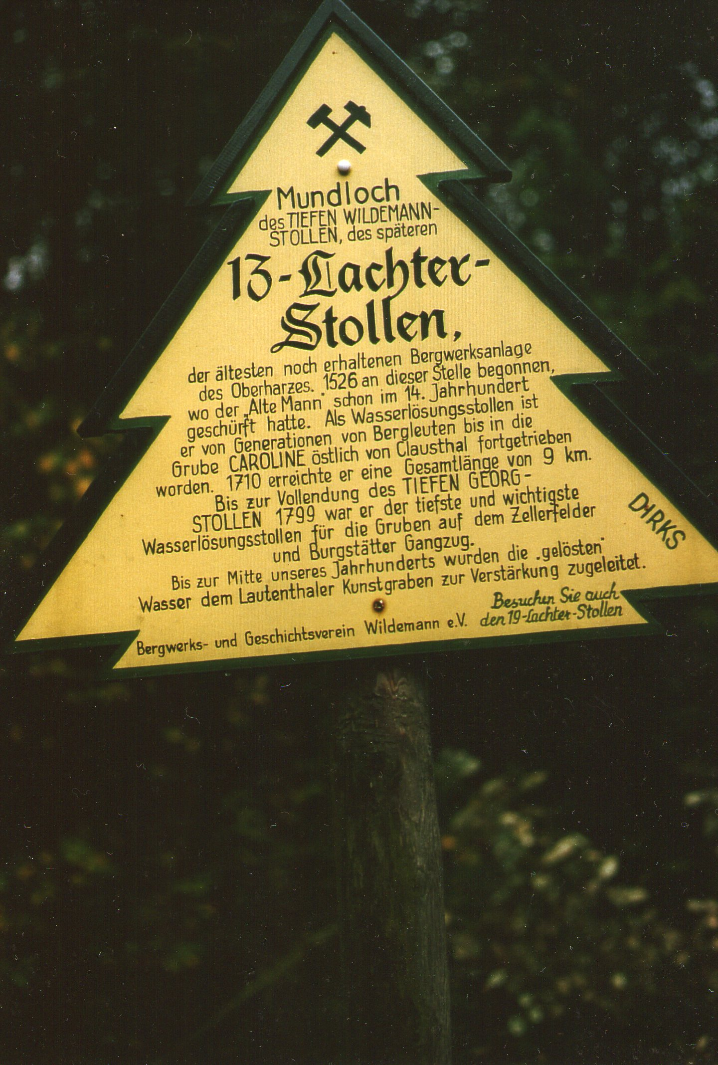 Hinweisschild am Mundloch des 13-Lachter-Stollens in Wildemann